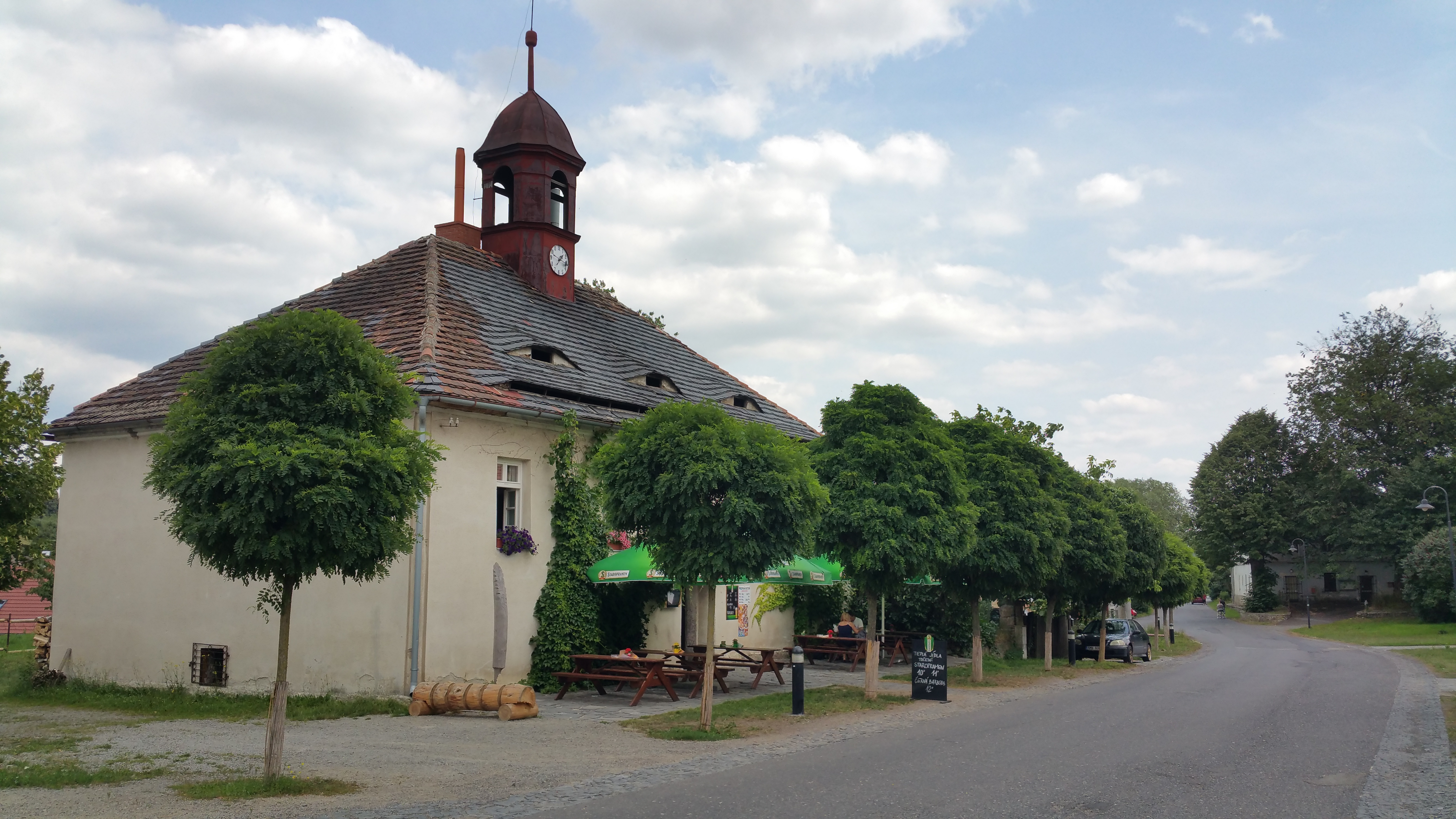 Budova staré školy s věžičkou v Dřevčicích. V současnosti Hospůdka Dřevčice.